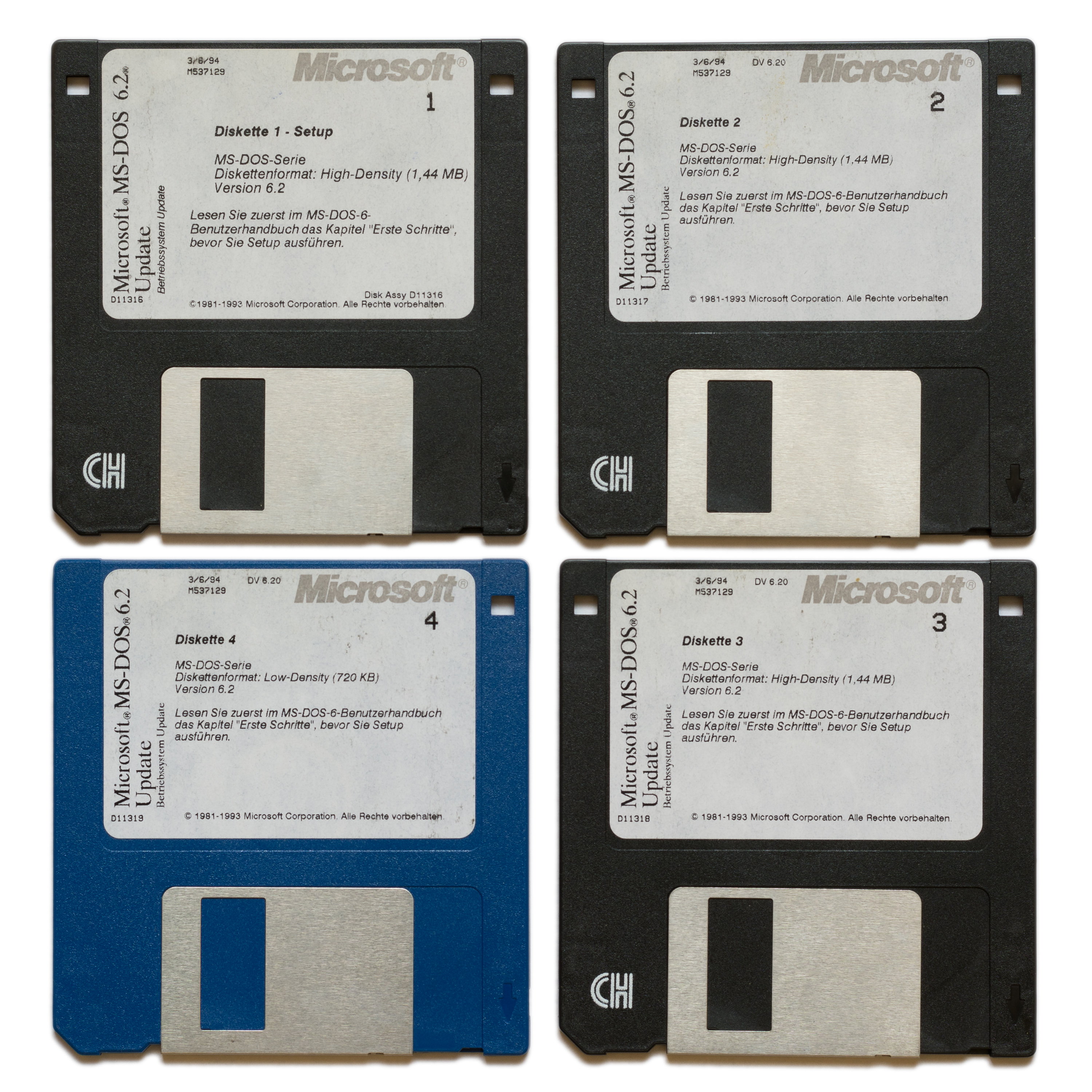 Installationsdisketten von MS-DOS 6.2 Update